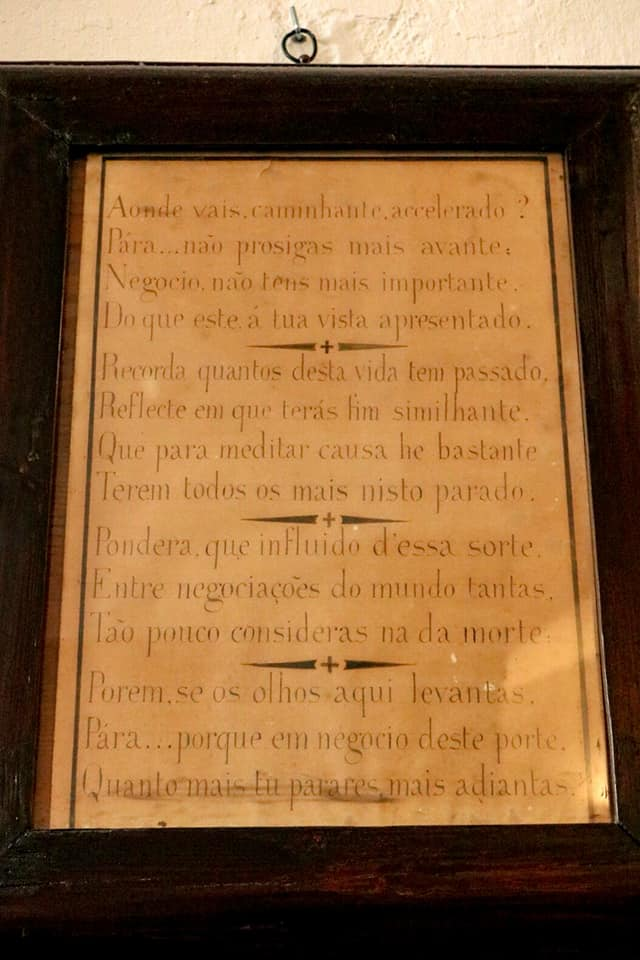 Poema afixado na Entrada